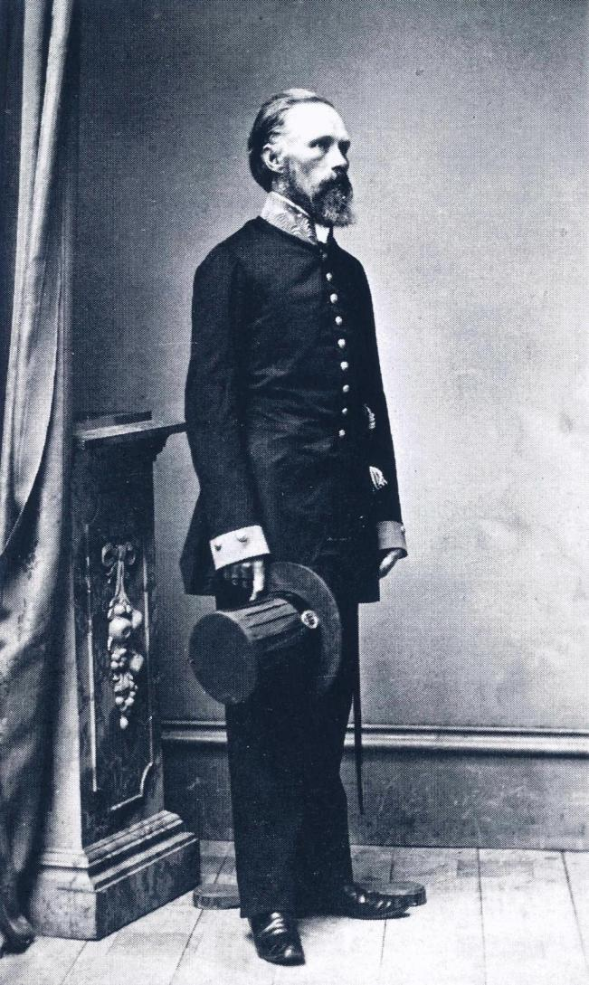 Kreivi Carl Magnus Creutz (1821–1893). Valokuvaaja tuntematon, ajankohta 1860-luvun loppu. (